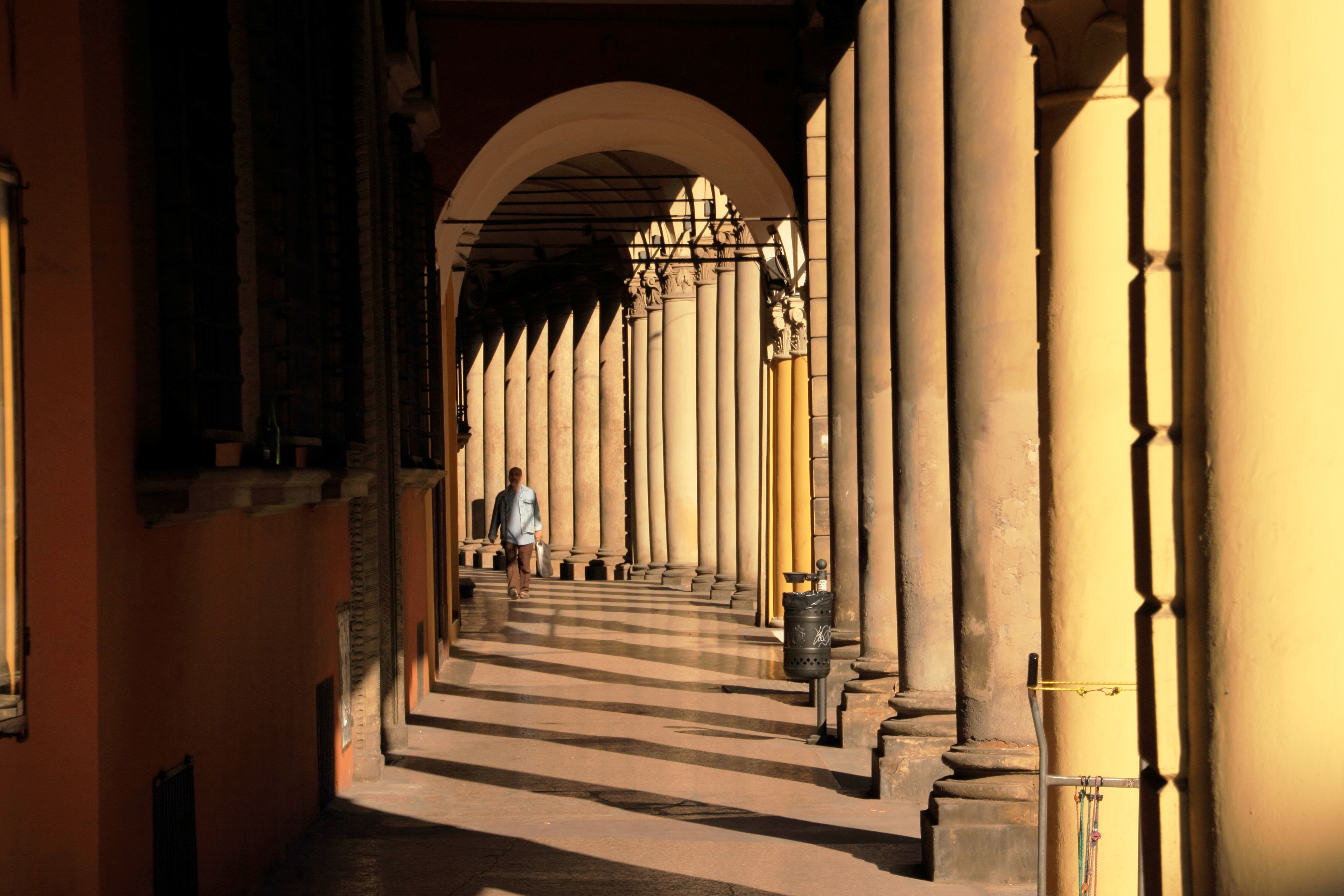 Portici (esclusi San Luca e Alemanni) This is a photo of a monument which is part of cultural heritage of Italy.